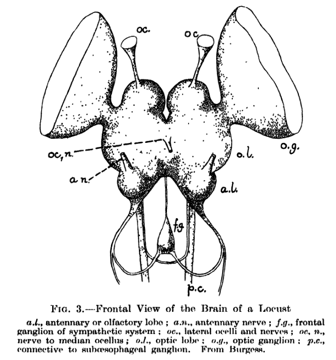 Locust brain